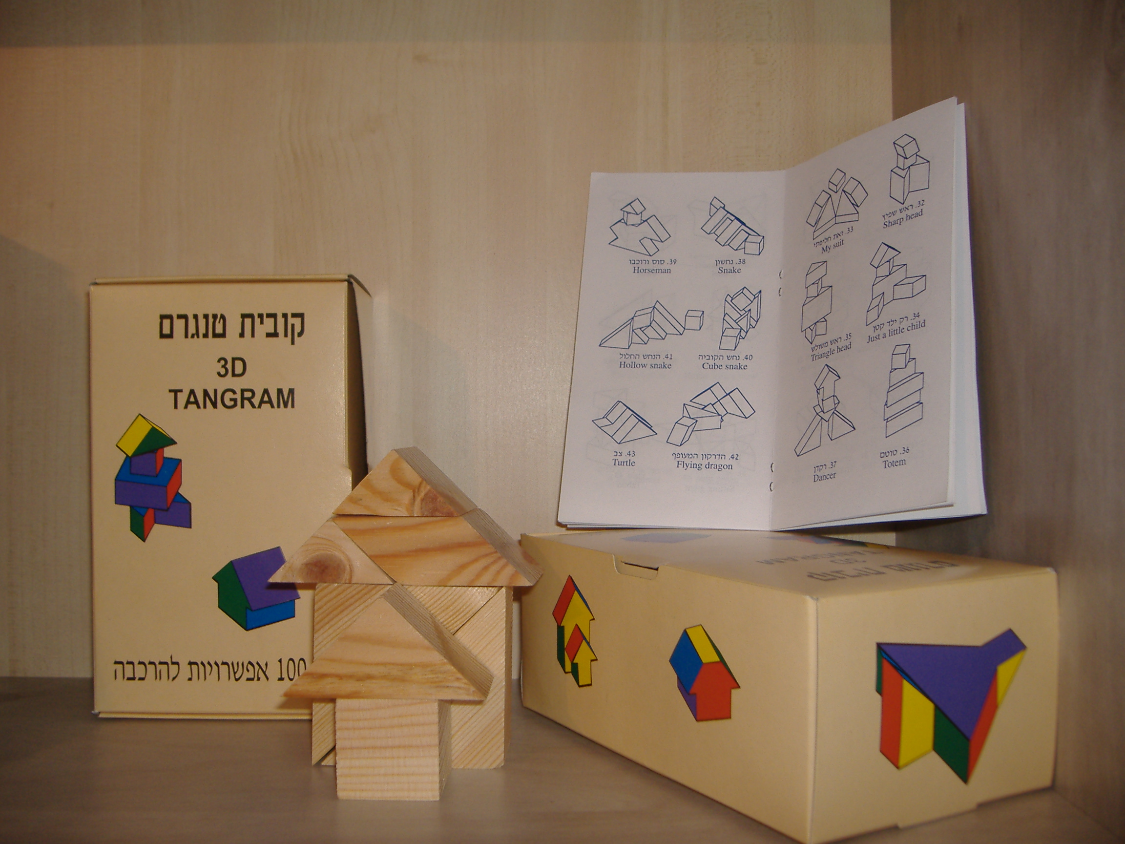 טנגרם תלת-ממדי. טוביה ליפשיץ, מבשרת ציון